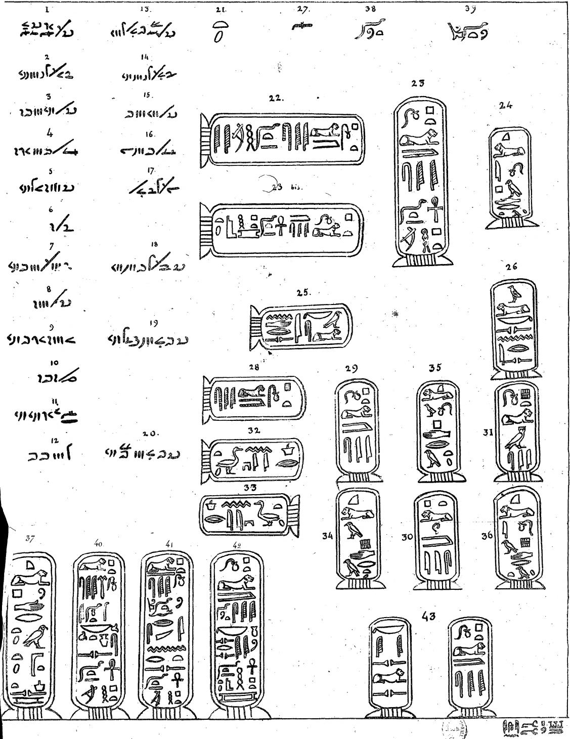 Lettre à M. Dacier relative à l'alphabet des hiéroglyphes phonétiques, page 54